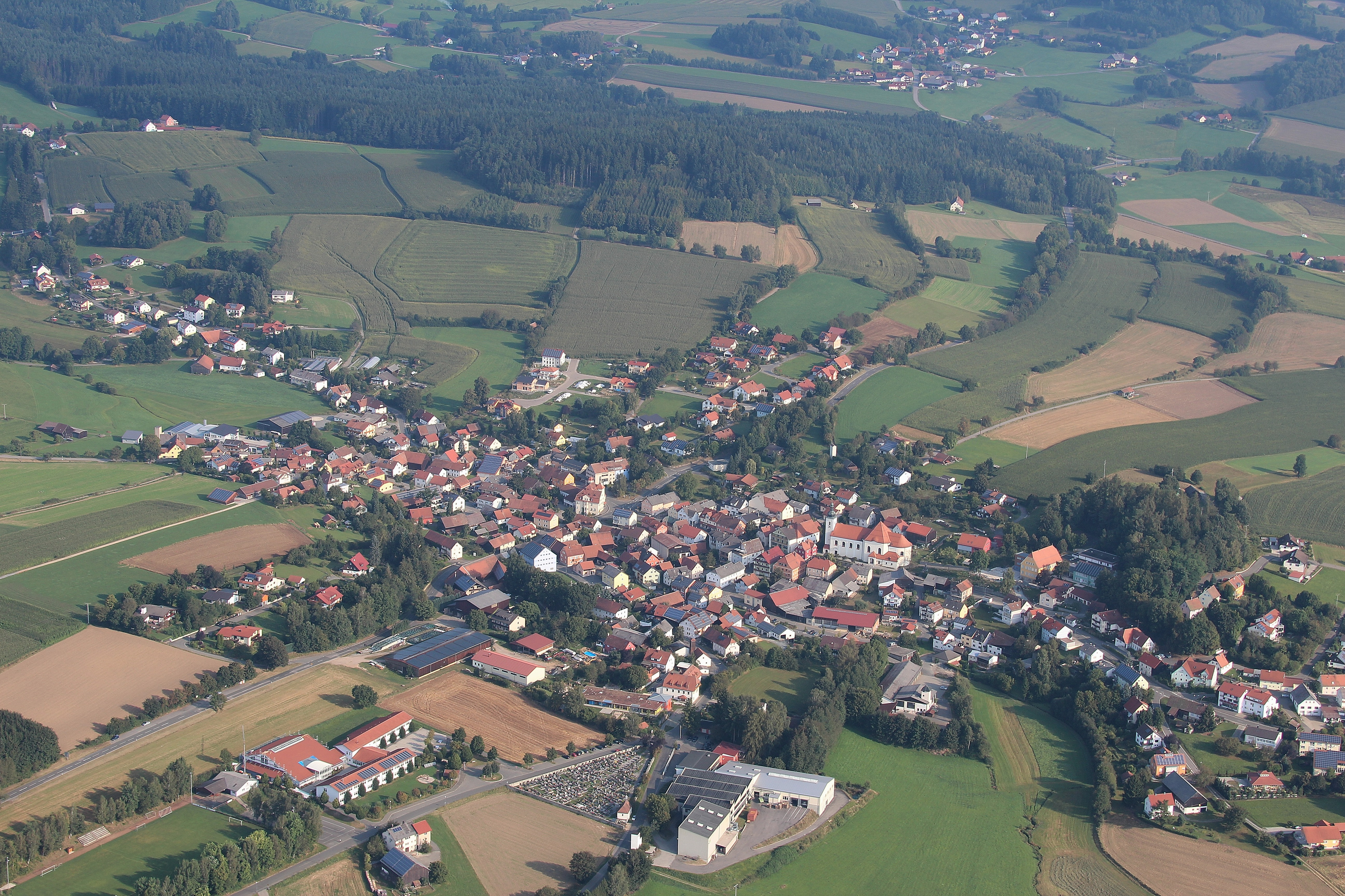 Tiefenbach, Landkreis Cham, Oberpfalz, Bayern